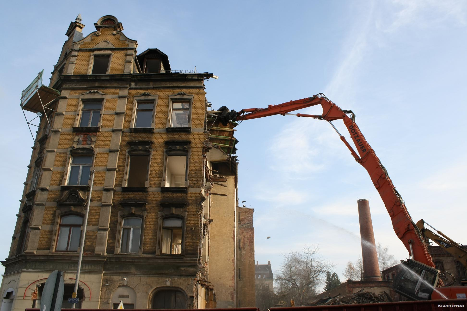 Folgen des Stadtumbaus in Chemnitz